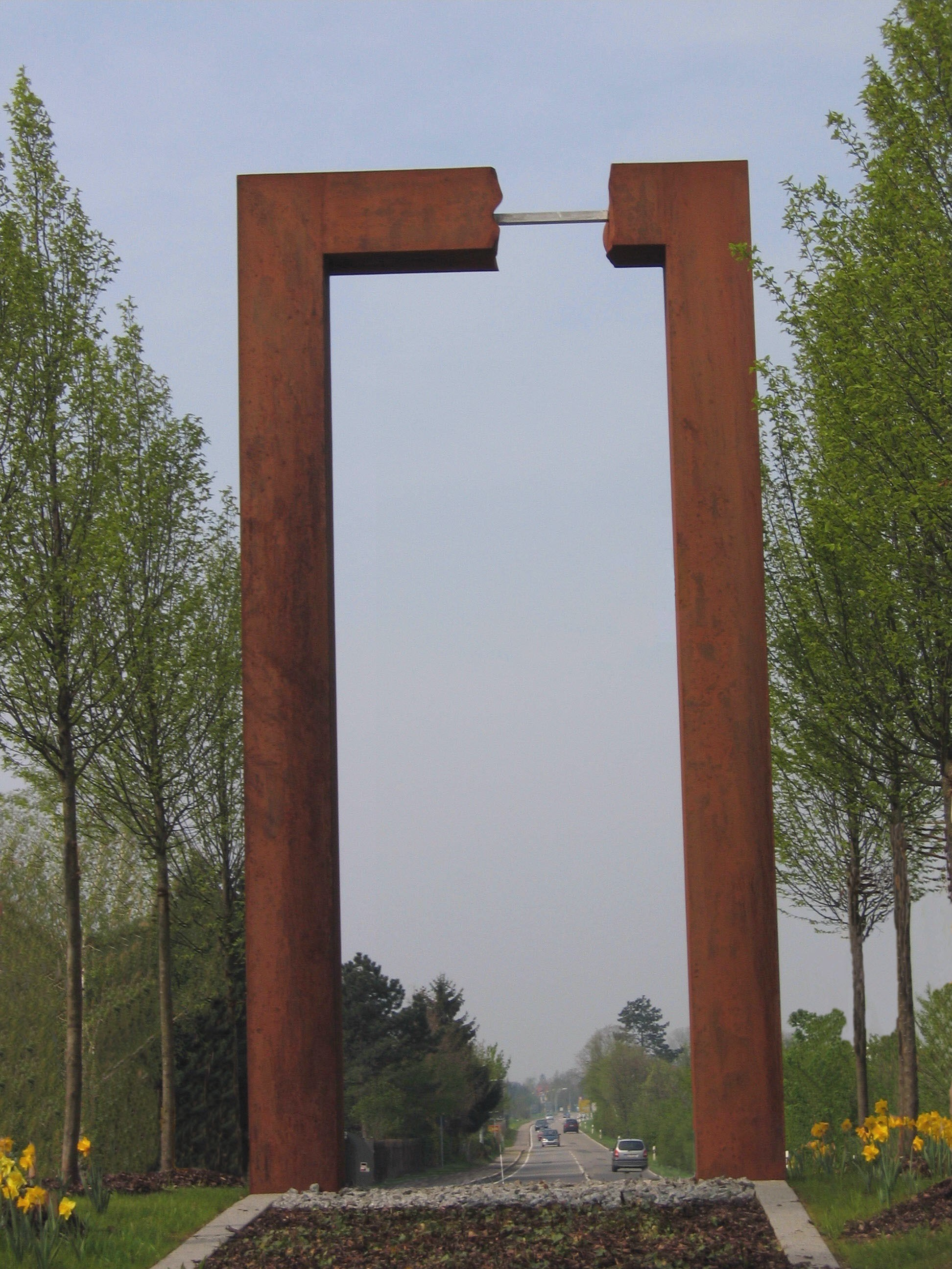 Sculpture Eingangstor Heddesheim by Kurt Fleckenstein in Heddesheim/Germany